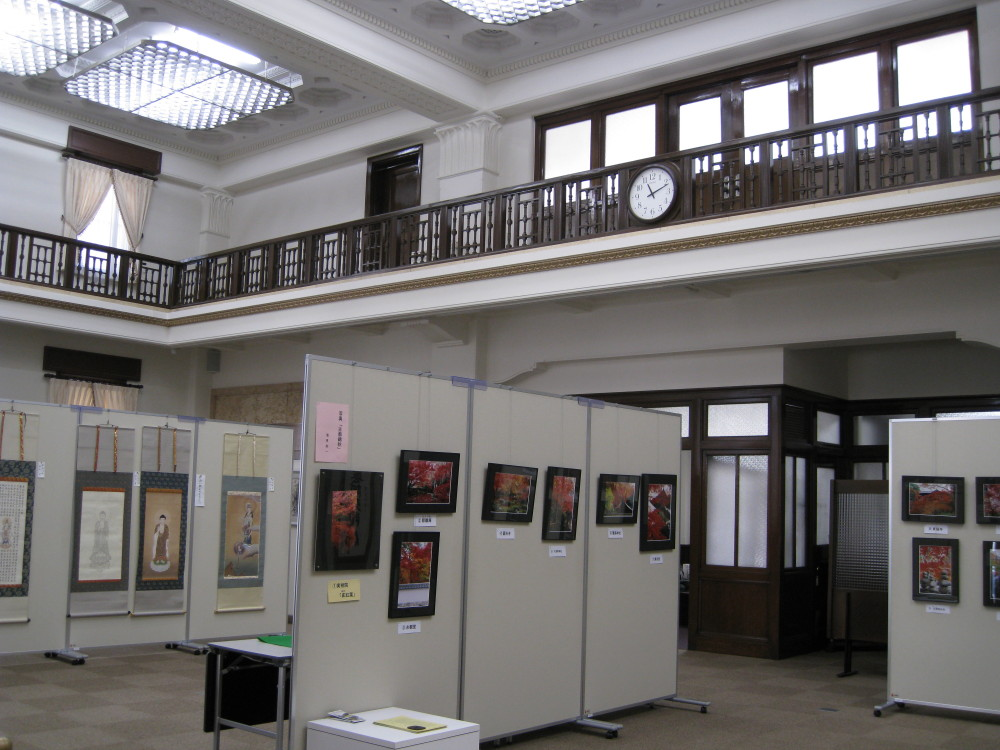 じゅうろくてつめいギャラリーの使用例（絵画作品等の展示風景）